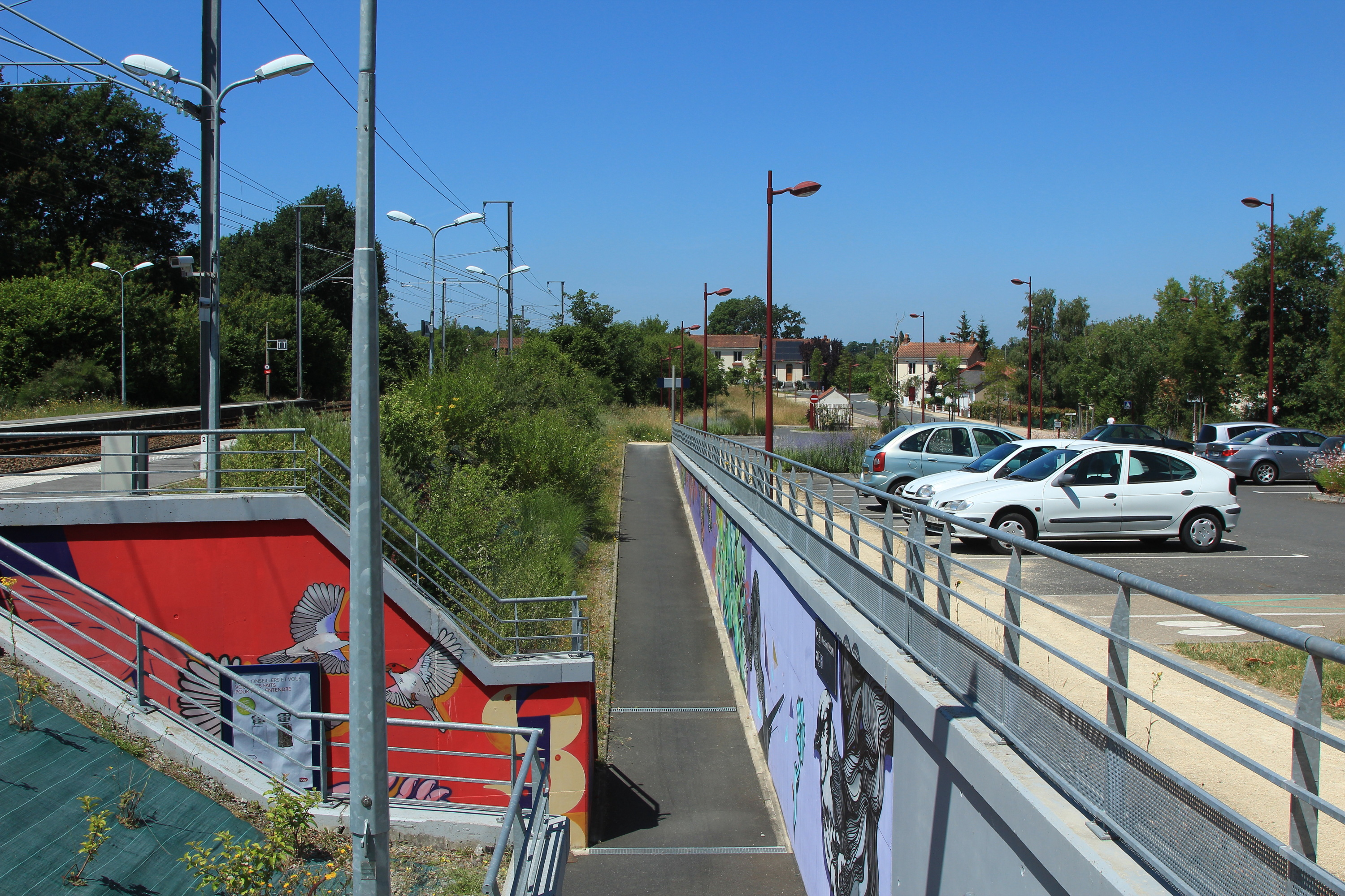 Rampe d'accès côté nord de la gare de la Haie-Fouassière